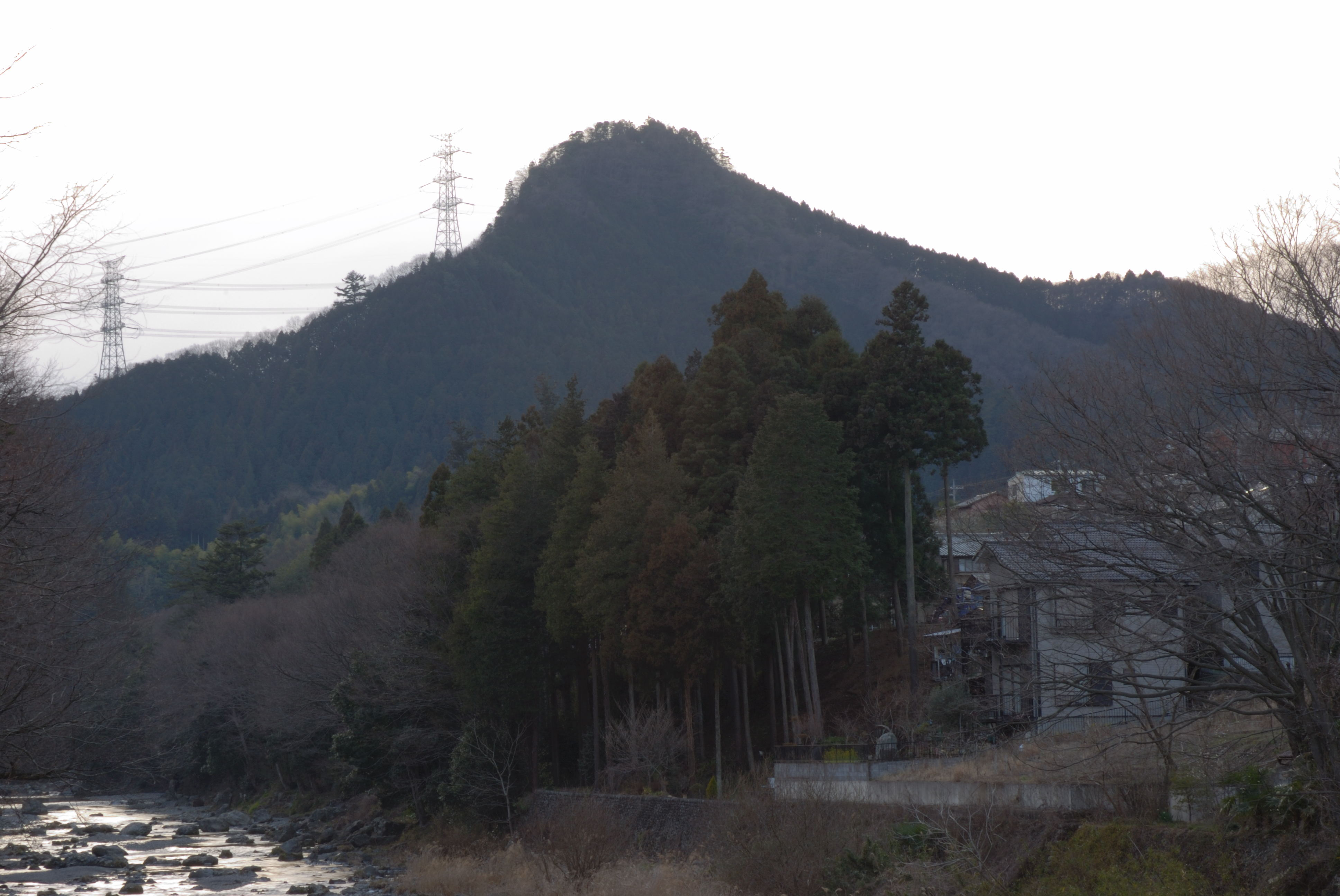 Tokura castle